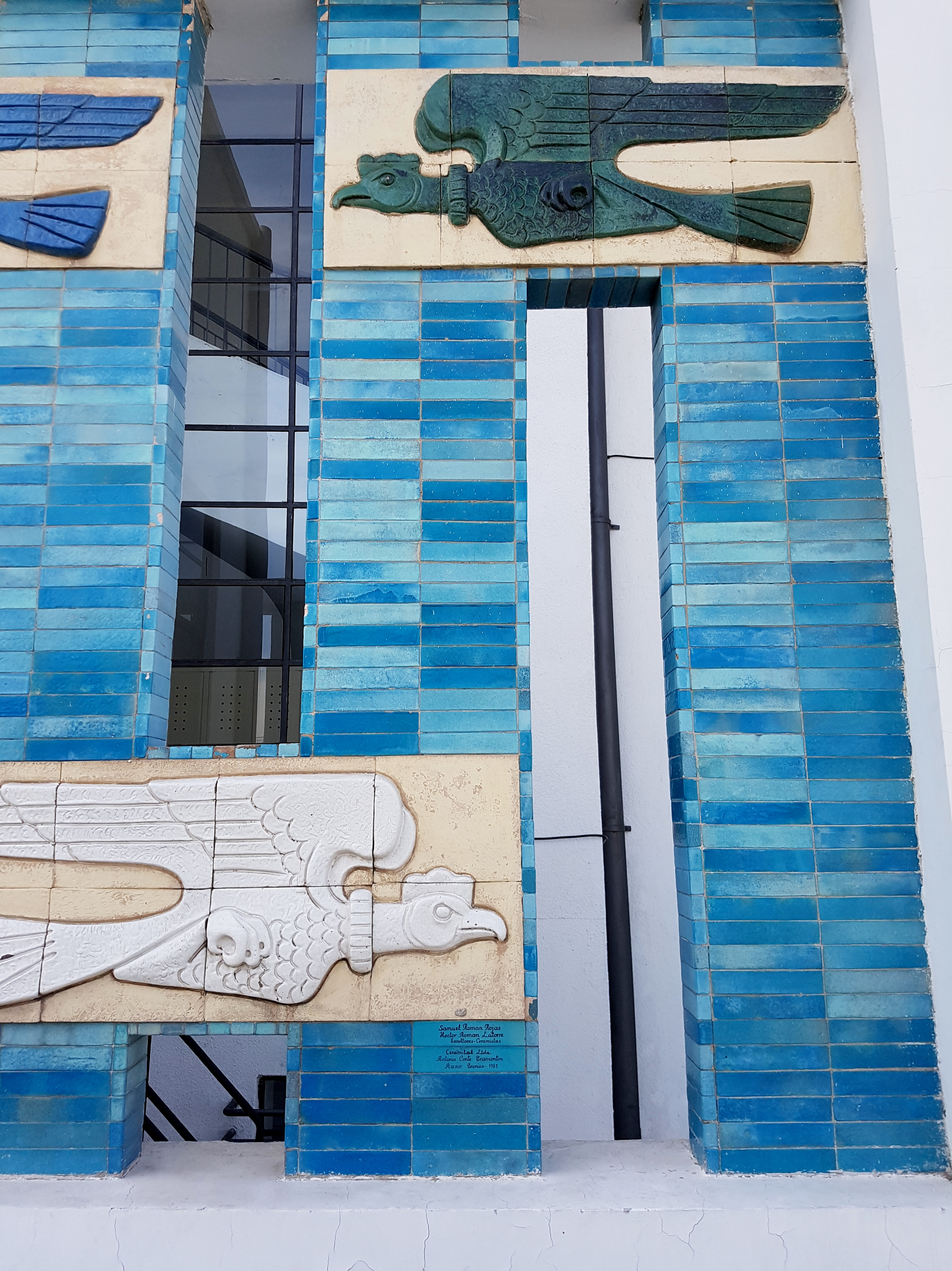 Mural Cóndores, obra de 1957 de los escultores Samuel Román y su hijo Héctor, quienes utilizaron la técnica de mosaico y cerámica (Ceramital Ltda; asesor técnico: Antonio Conte Tramontín). Fue restaurado para la inauguración del Centro Nacional de Arte Contemporáneo Cerrillos que se estableció en 2017 en el antiguo edificio modernista del aeropuerto Los Cerrillos.